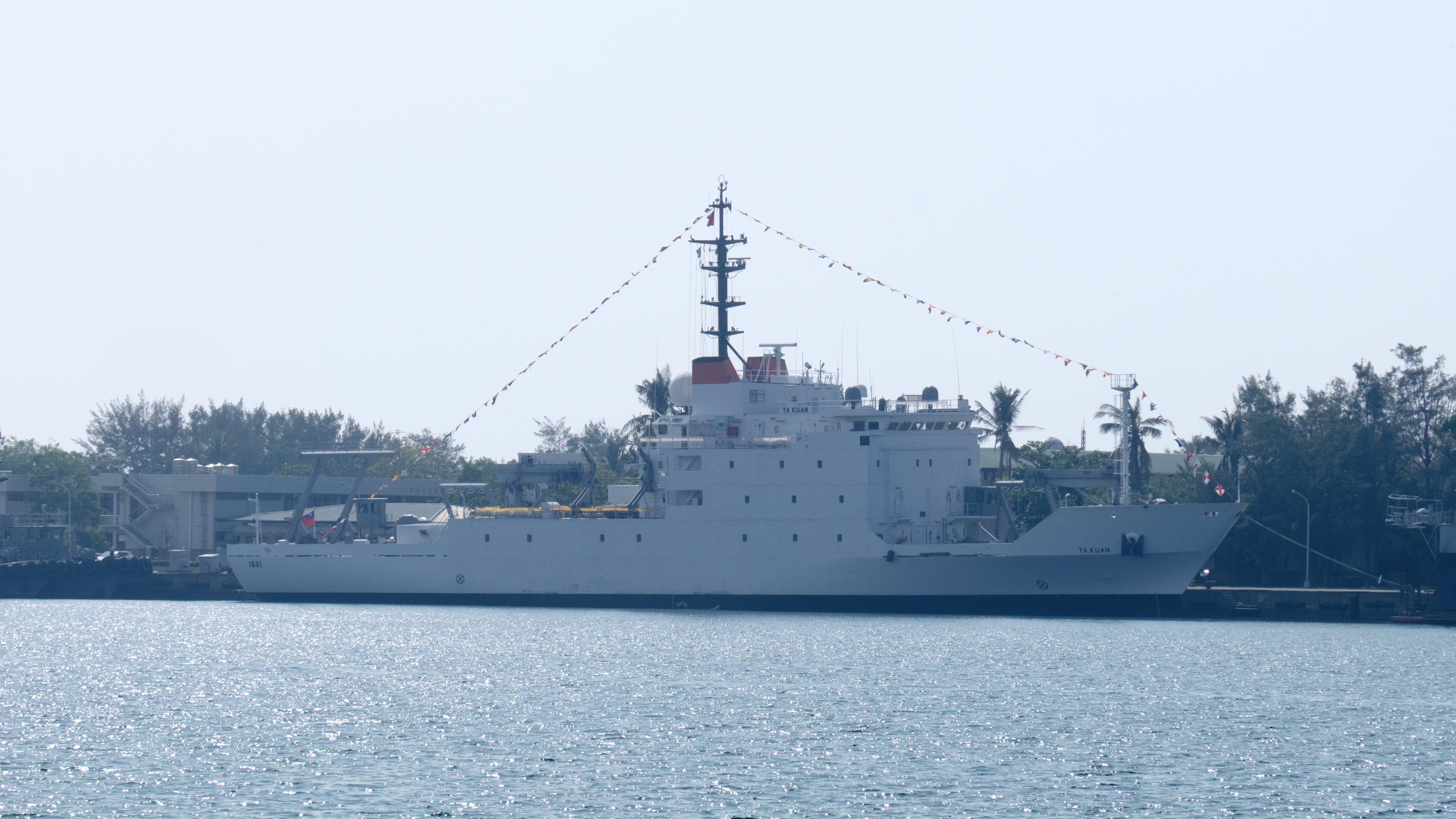 停泊左營軍港的海洋測量艦達觀（AGS-1601），攝於2015年營區開放活動。